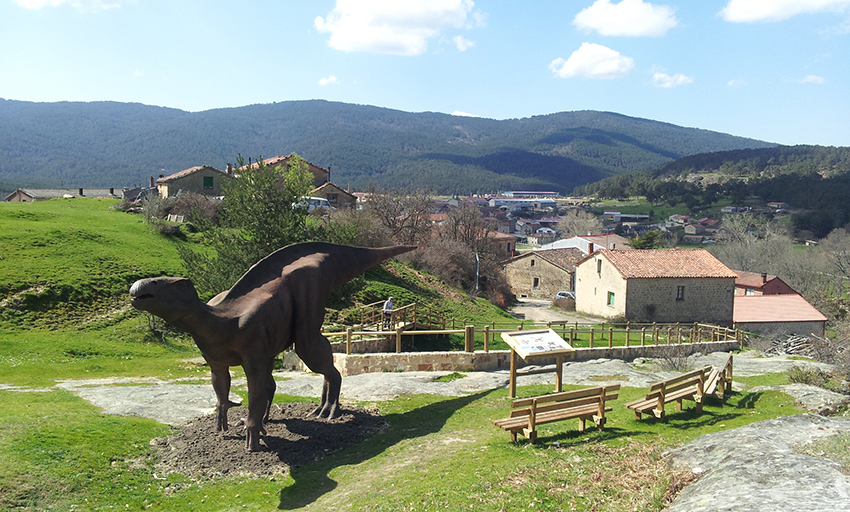 Réplica de dinosaurio colocada junto a la mesa interpretativa del yacimiento de El Frontal en Regumiel de la Sierra (Burgos). Proyecto realizado por Paleoymás, en 2013, para la consolidación, protección y puesta en valor de los yacimientos de icnitas de la zona.